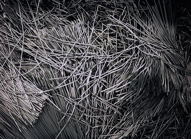 Blei, Sammlung Deutscher Bundestag (Foto: Philine von Sell)